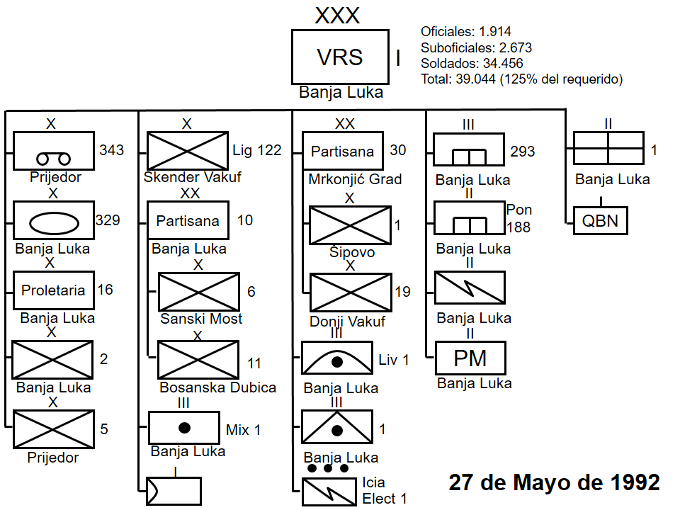 Organización del 1er Cuerpo de la Krajina del Ejército de la Republika Srpska Krajina (1K.K. VRS). Sobre la base de documento ICTY 1st Krajina Corps Command. Report on Elimination of Green Berets. Stara Gradiska. 27 de mayo de 1992.